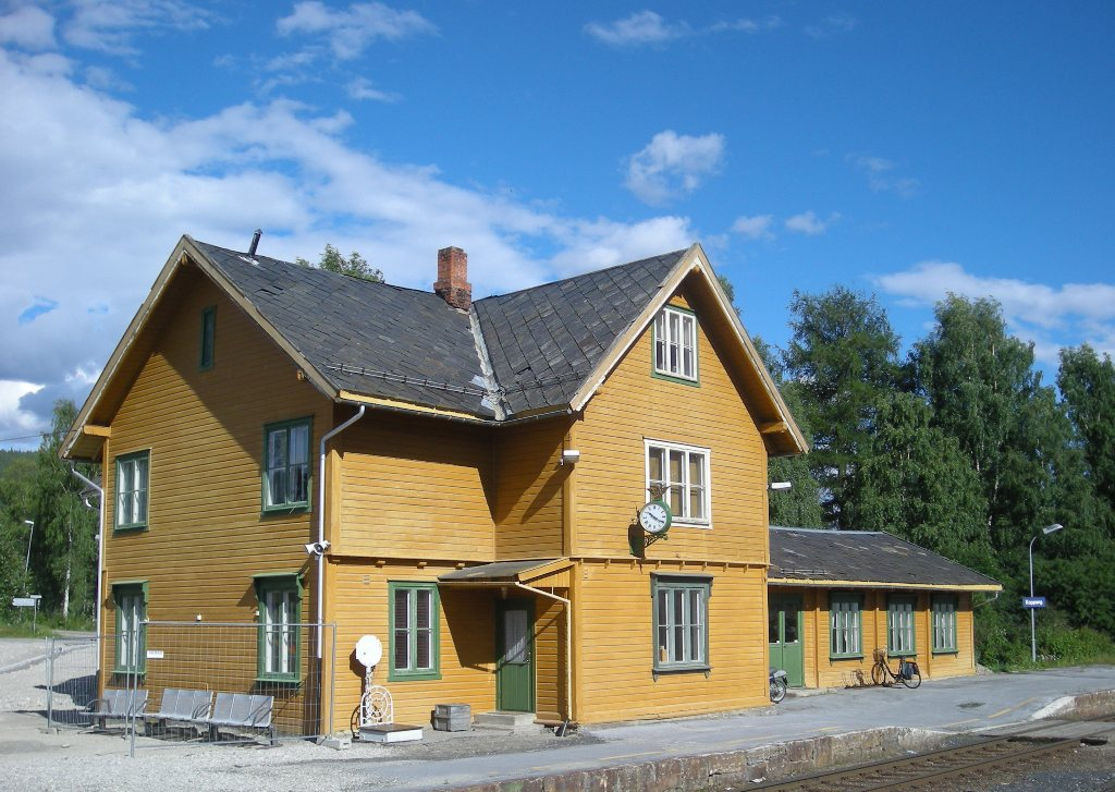 Den gamle stasjonsbygningen på Koppang stasjon